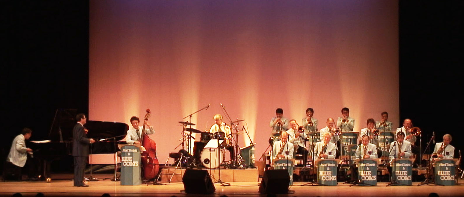 日比谷公会堂